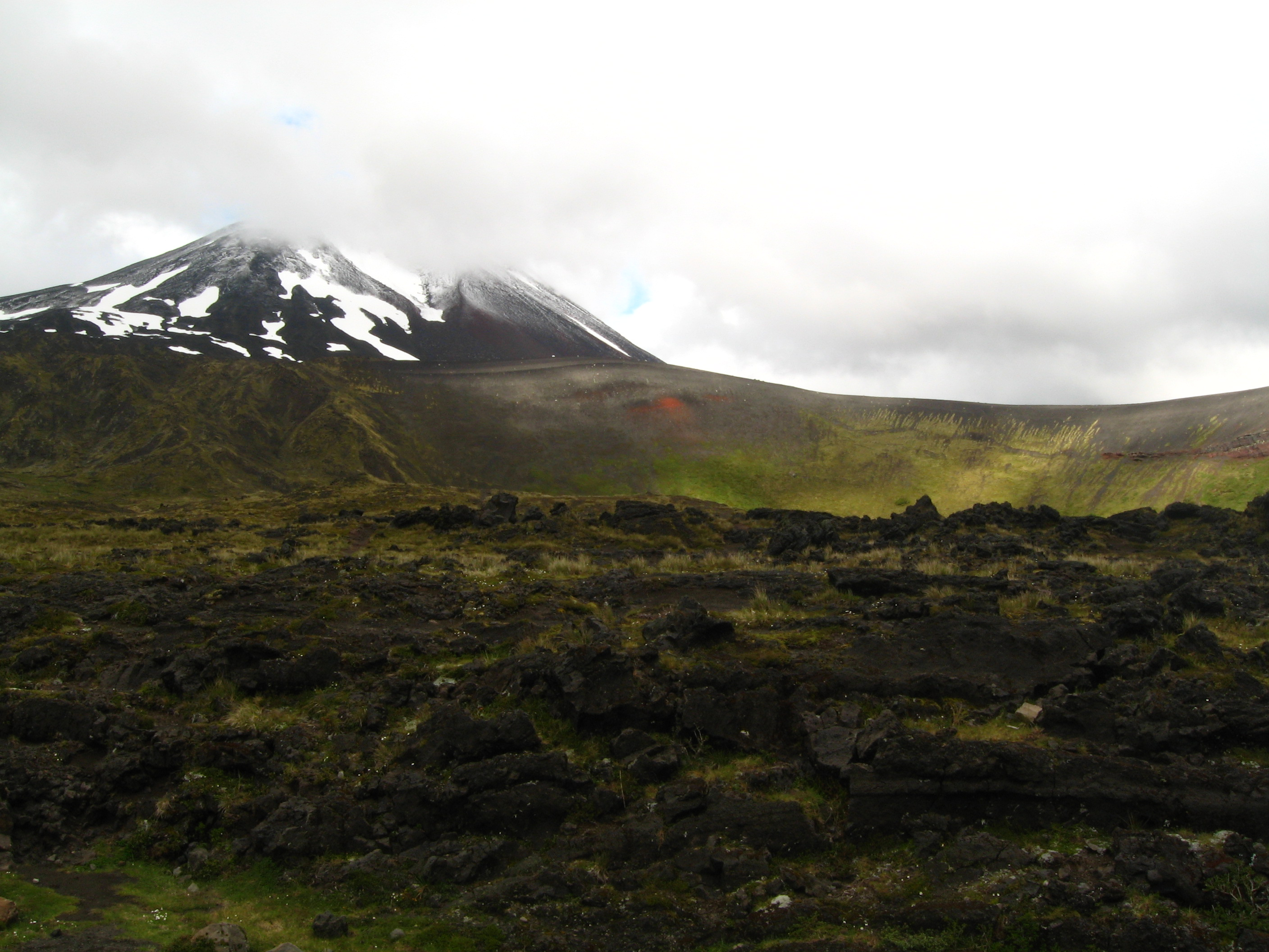 En el fondo: volcán Casablanca en primer plano el cráter Raihuen.